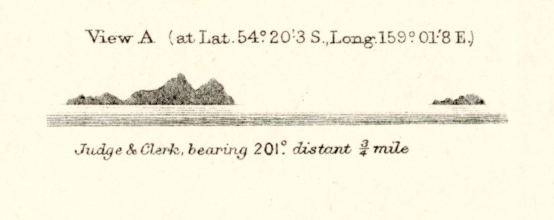 nautical chart of Maquarie Island (with outlying islands Bishop and Clerk, Judge and Clerk), and anchorages in the South Pacific Ocean